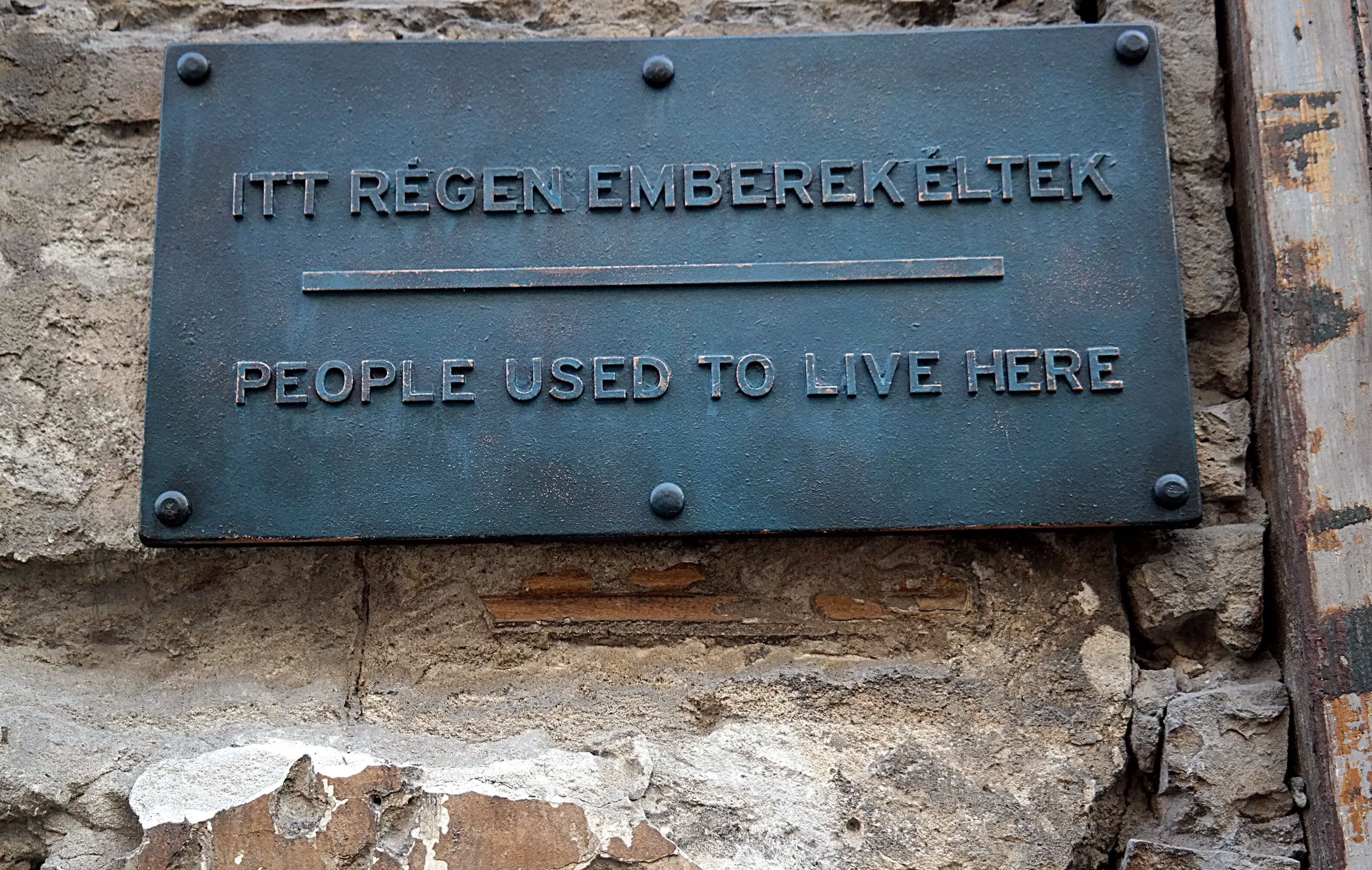 Emléktábla a VII. kerület Kazinczy utca 14. számú ház falán. A „Nem mi voltunk!“ művészeti csoport akciója.